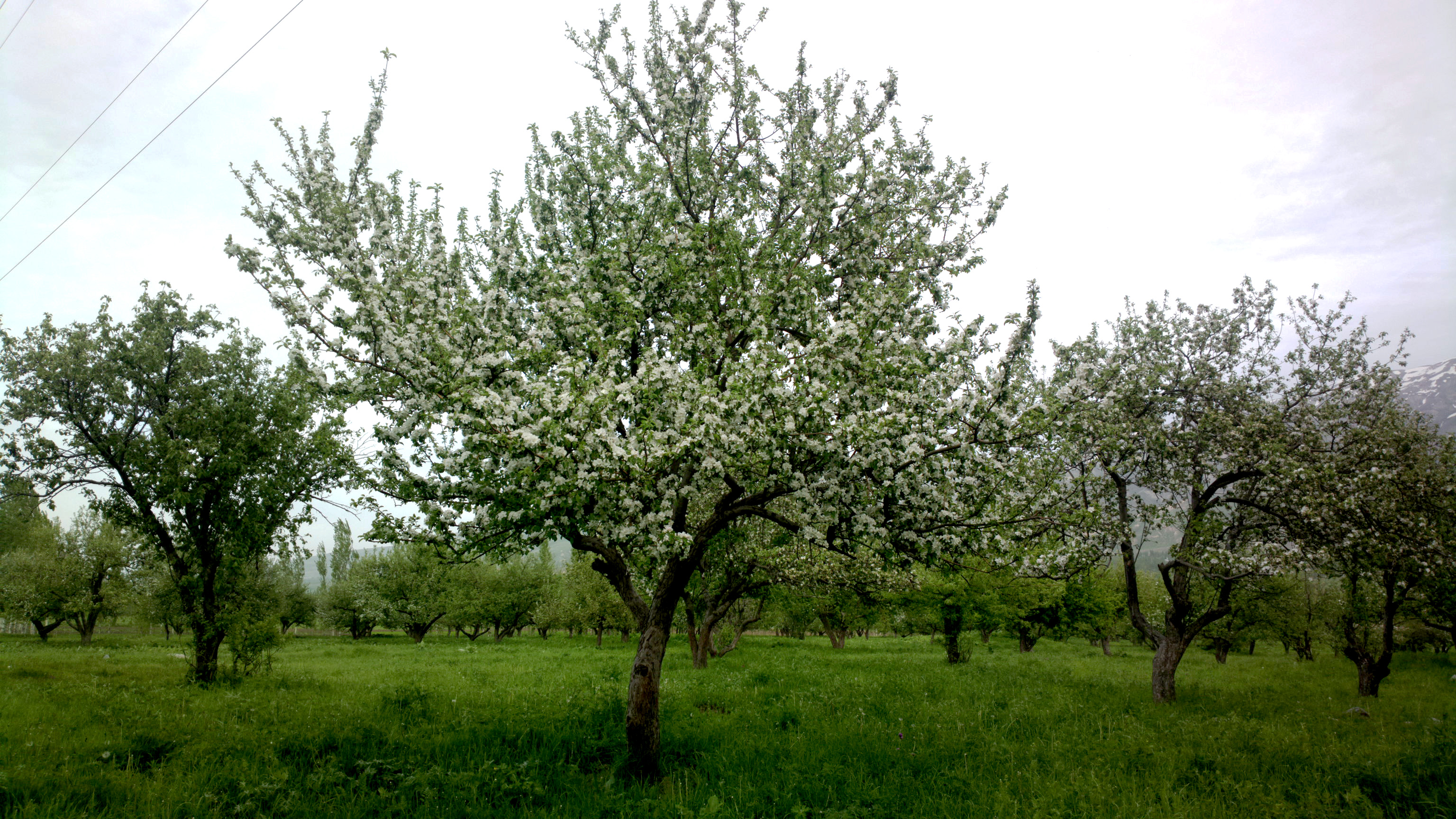 Тоҷикӣ: Боғи себ дар айни шукуфоӣ. Деҳаи Элоки ноҳияи Файзобод